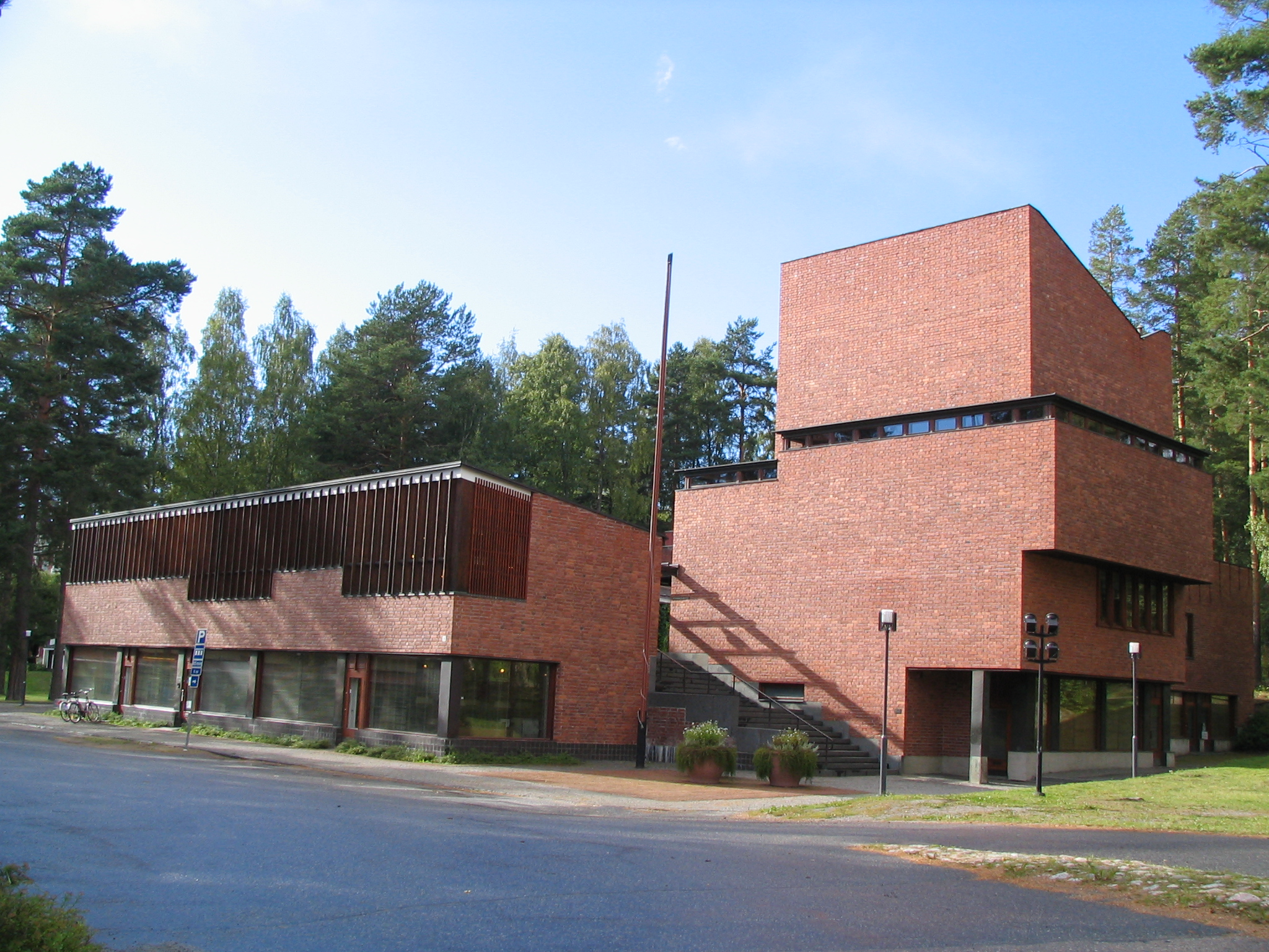 Säynätsalo town hall and library, Jyväskylä, Finland